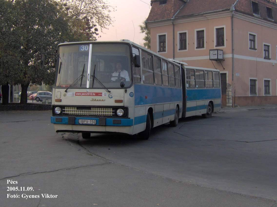 Ikarus 280-as Pécsett a 30-as vonalon